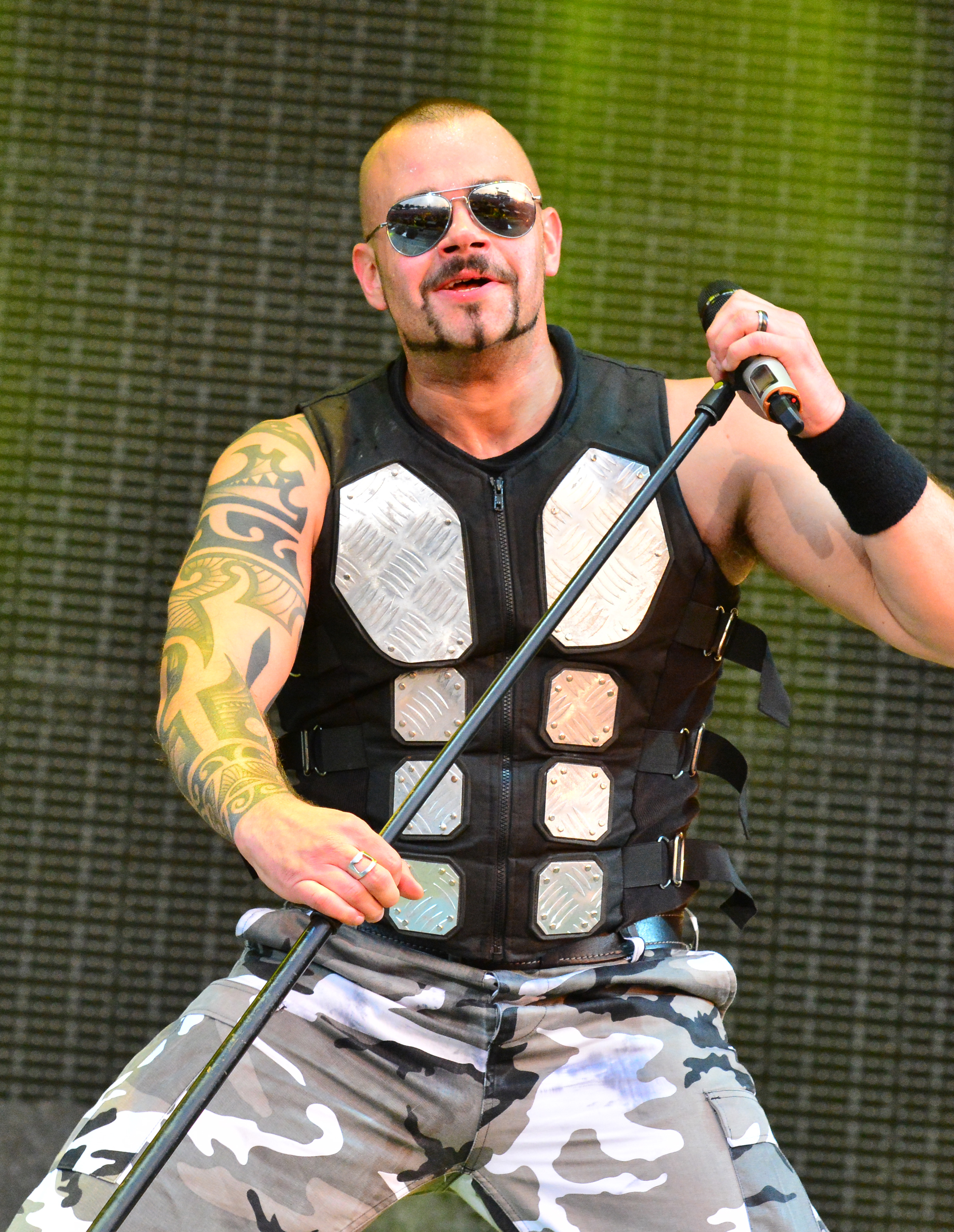 Sabaton beim Wacken Open Air 2015